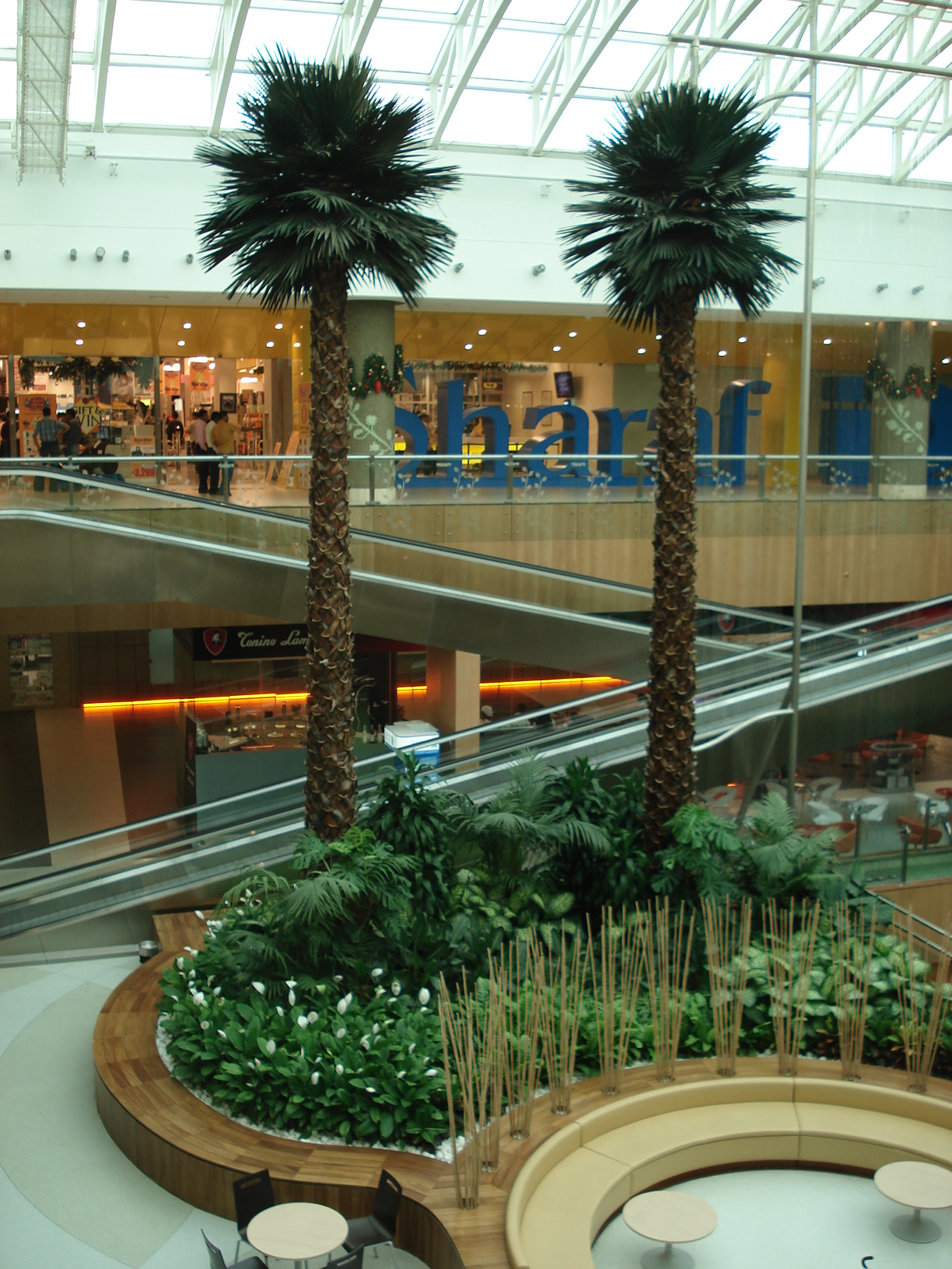 Times Square center, Dubai